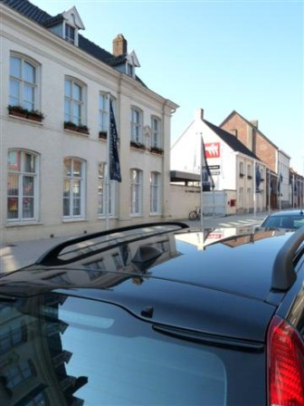 Recente foto van het VTI Poperinge